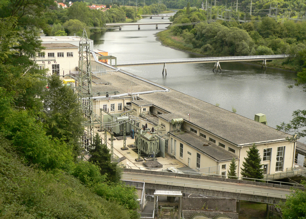 Pumpspeicherkraftwerk Waldeck